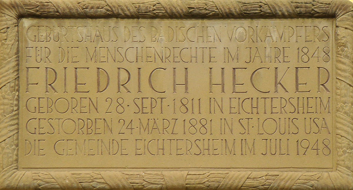 Gedenktafel am Heckerhaus in Angelbachtal-Eichtersheim